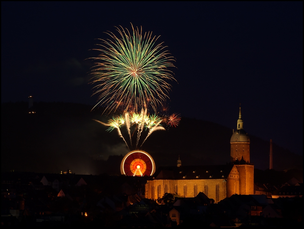 Die Aufnahme zeigt das Annaberger Kät-Feuerwerk vom 24.06.2006 mit der St. Annen-Kirche im Vordergrund.